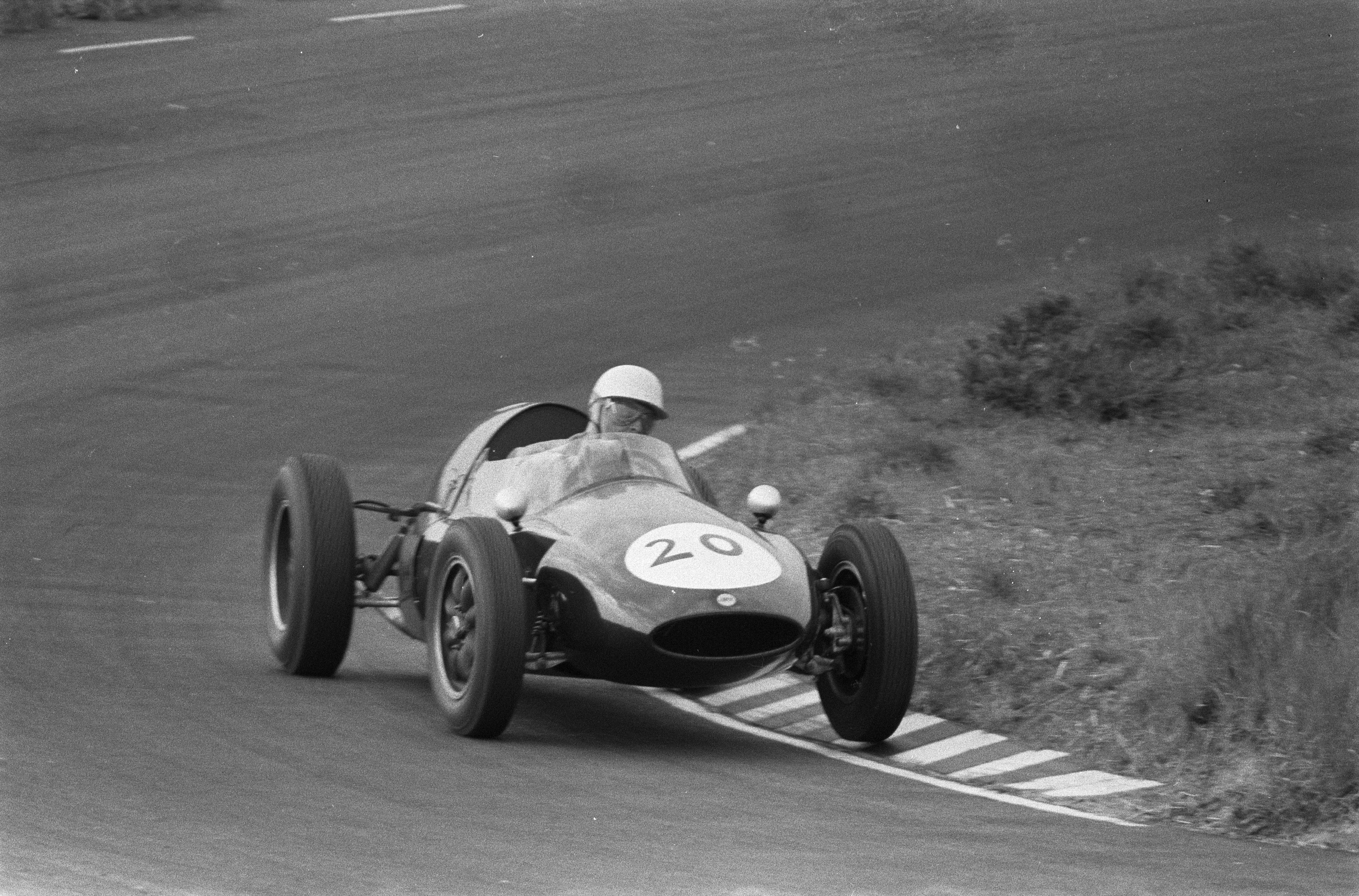 Collectie / Archief : Fotocollectie Anefo Reportage / Serie : [ onbekend ] Beschrijving : Autoraces op het circuit van Zandvoort Datum : 6 juni 1960 Locatie : Noord-Holland, Zandvoort Trefwoorden : auto's, sport Fotograaf : Pot, Harry / Anefo Auteursrechthebbende : Nationaal Archief Materiaalsoort : Negatief (zwart/wit) Nummer archiefinventaris : bekijk toegang 2.24.01.05 Bestanddeelnummer : 911-3163